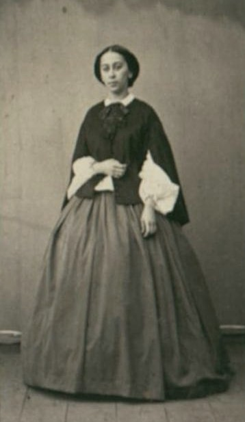 Варвара Сергеевна Муханова, ур. Голицына (1838—1897), первый муж (с 1858) Алексей Сергеевич Муханов, второй муж (с 1868) князь Андрей Александрович Ливен.